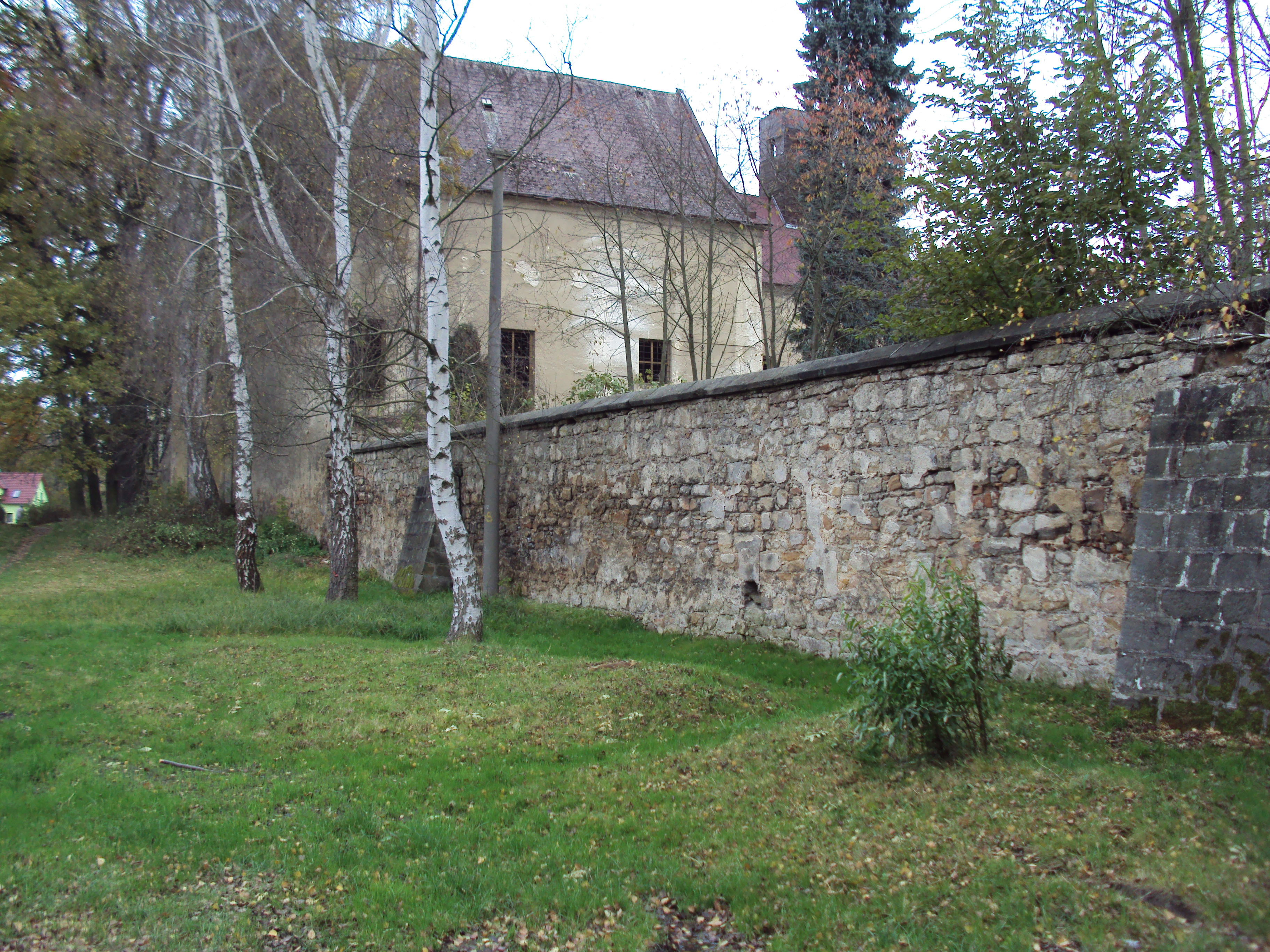 Klášter kapucínů v Zákupech, nám. Míru, dnes ruina